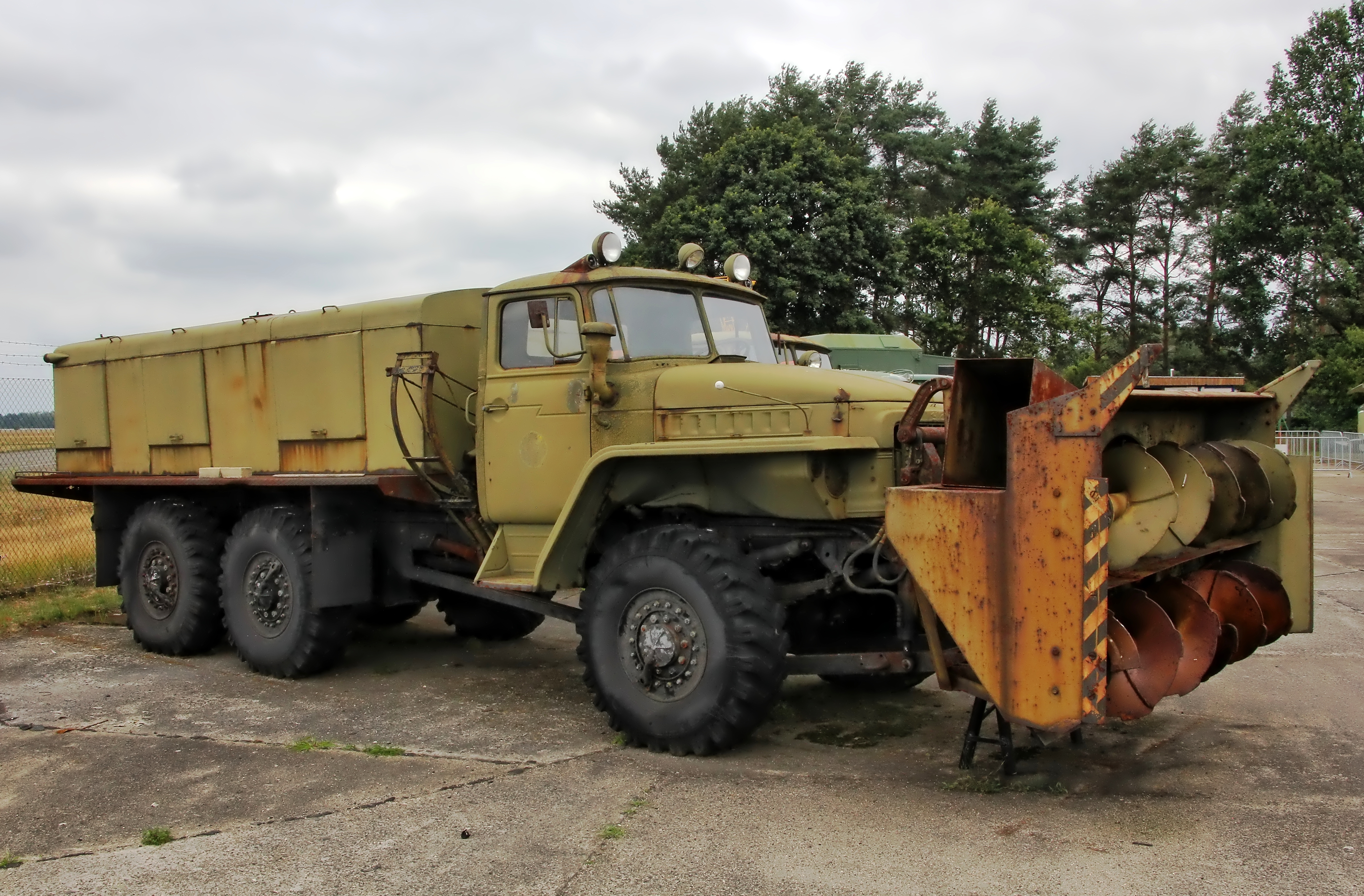 Schneefräse D-902 auf Ural-375E im Luftfahrttechnischen Museum Rothenburg, Seitenansicht.